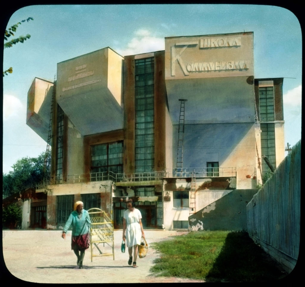 Москва. Клуб Русакова Союза Коммунальников